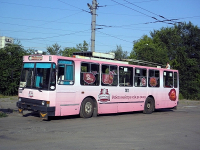 окончание смени